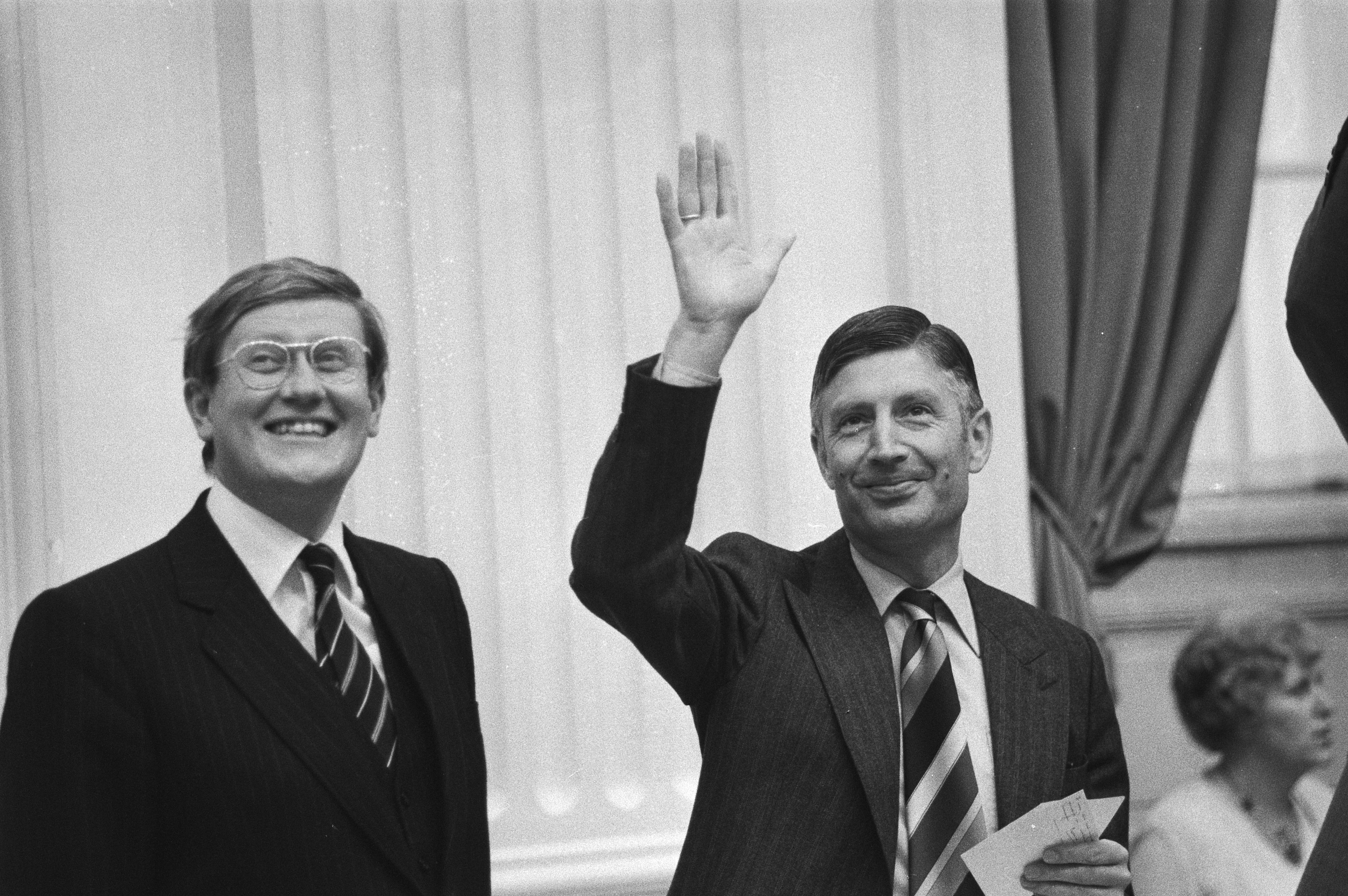 Collectie / Archief : Fotocollectie Anefo Reportage / Serie : Algemene Beschouwingen 1979 in de Tweede Kamer Beschrijving : Minister Wiegel (l) en premier van Agt, zwaaiend Datum : 9 oktober 1979 Locatie : Den Haag, Zuid-Holland Trefwoorden : ministers, ministers-presidenten, parlementaire debatten, portretten, vergaderingen Persoonsnaam : Agt, Dries van, Wiegel, Hans Instellingsnaam : Tweede Kamer Fotograaf : Suyk, Koen / Anefo Auteursrechthebbende : Nationaal Archief Materiaalsoort : Negatief (zwart/wit) Nummer archiefinventaris : bekijk toegang 2.24.01.05 Bestanddeelnummer : 930-4836